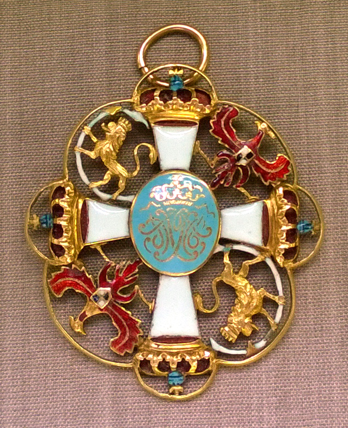 Order Wierności (Muzeum Amalienborg)